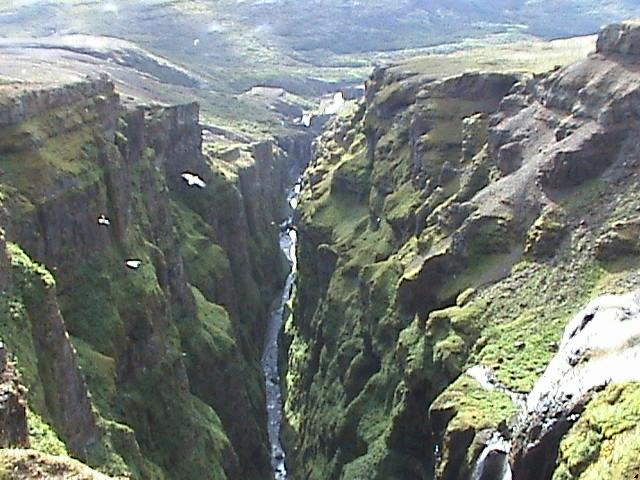 Schlucht des Glymur